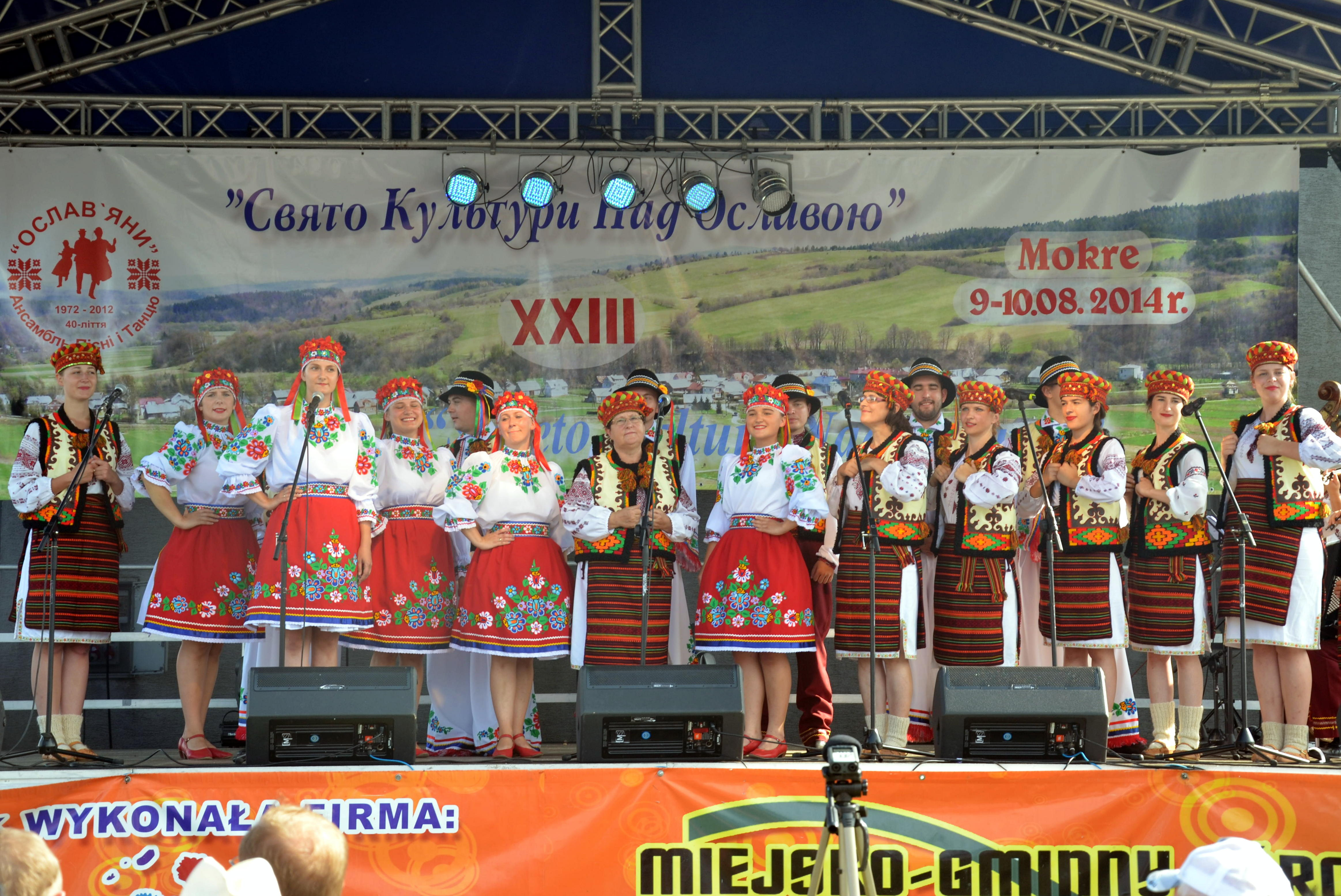 Ukrainisches Volksfest in Mokre